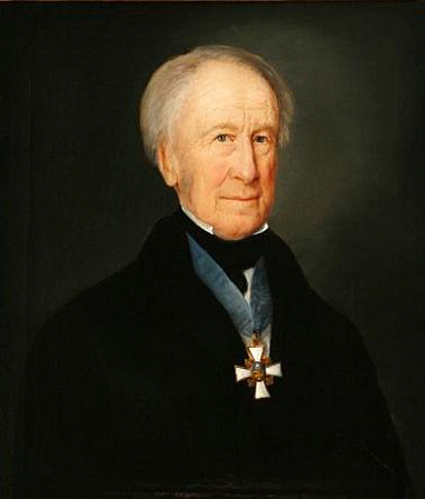 Wilhelm Carl Ferdinand von Ahlefeldt-Laurvigen (1769-1852) Domherr zu Lübeck (1715).